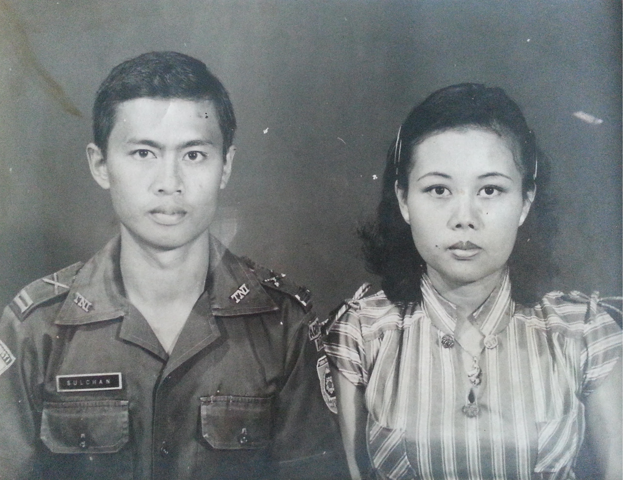 Muslihan Sulchan saat berpangkat Letnan Satu bersama istri Sutji Rahayu pada bulan November 1978